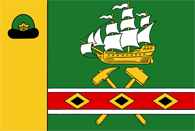 Флаг МО — Кораблинское городское поселение